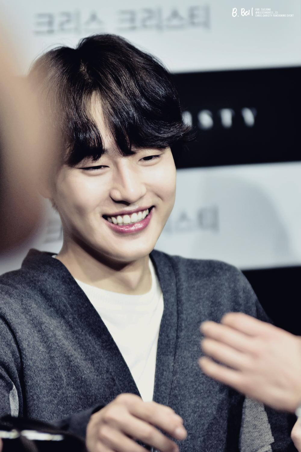 딱 1년전 배우님이시네요